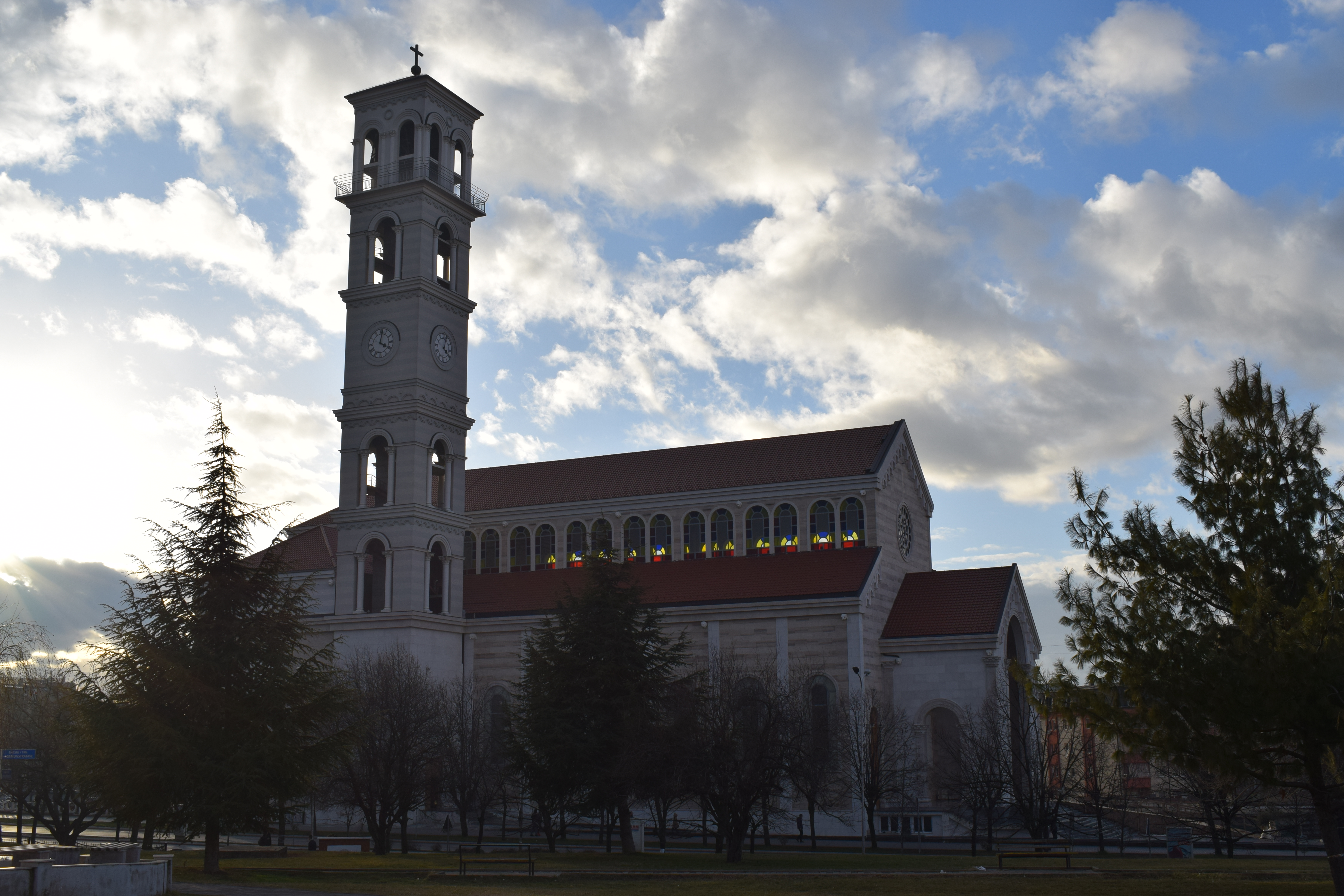 Katedralja Katolike, Prishtine, Kosove